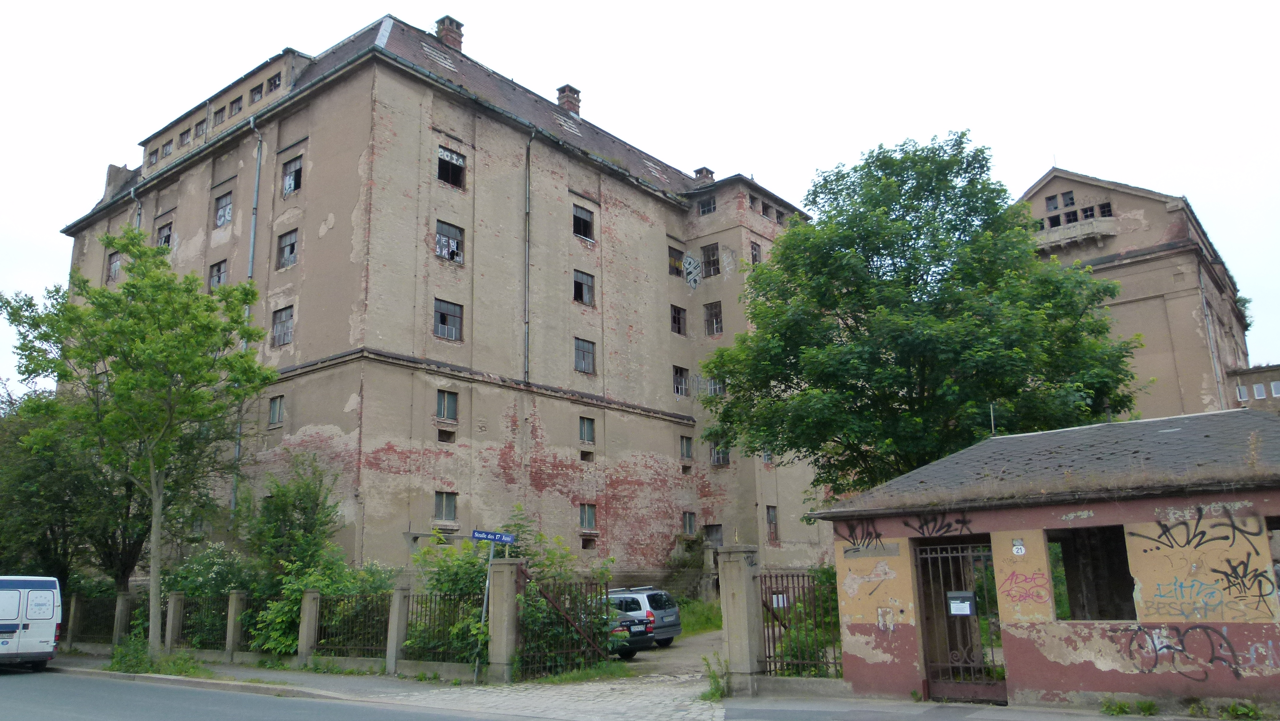 Denkmalgeschütztes Fabrikgebäude, Straße des 17. Juni 21, Niedersedlitz, Dresden, Sachsen